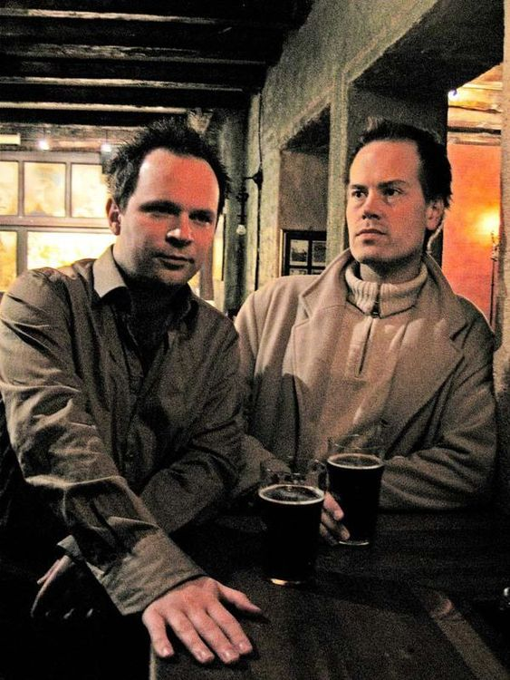 Imagem da banda Keldian.